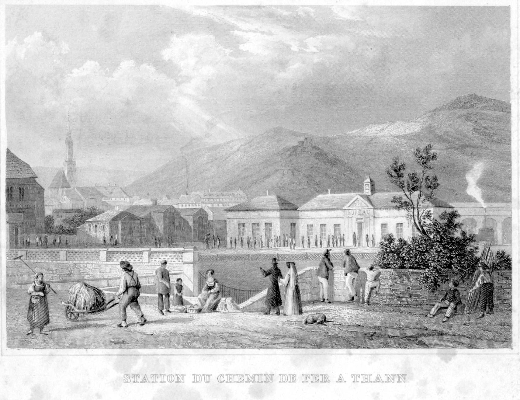 gravure de la station du chemin de fer de Thann (Haut-Rhin).